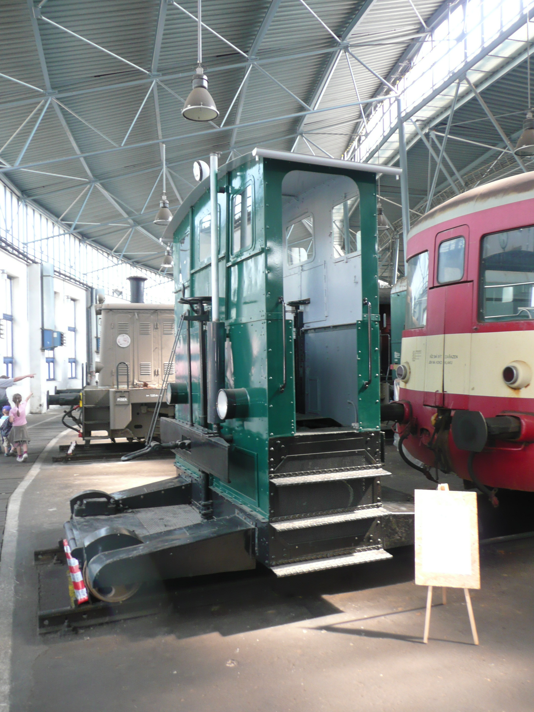 Breuer-Traktor T 200.002 im Heizhaus Chomutov